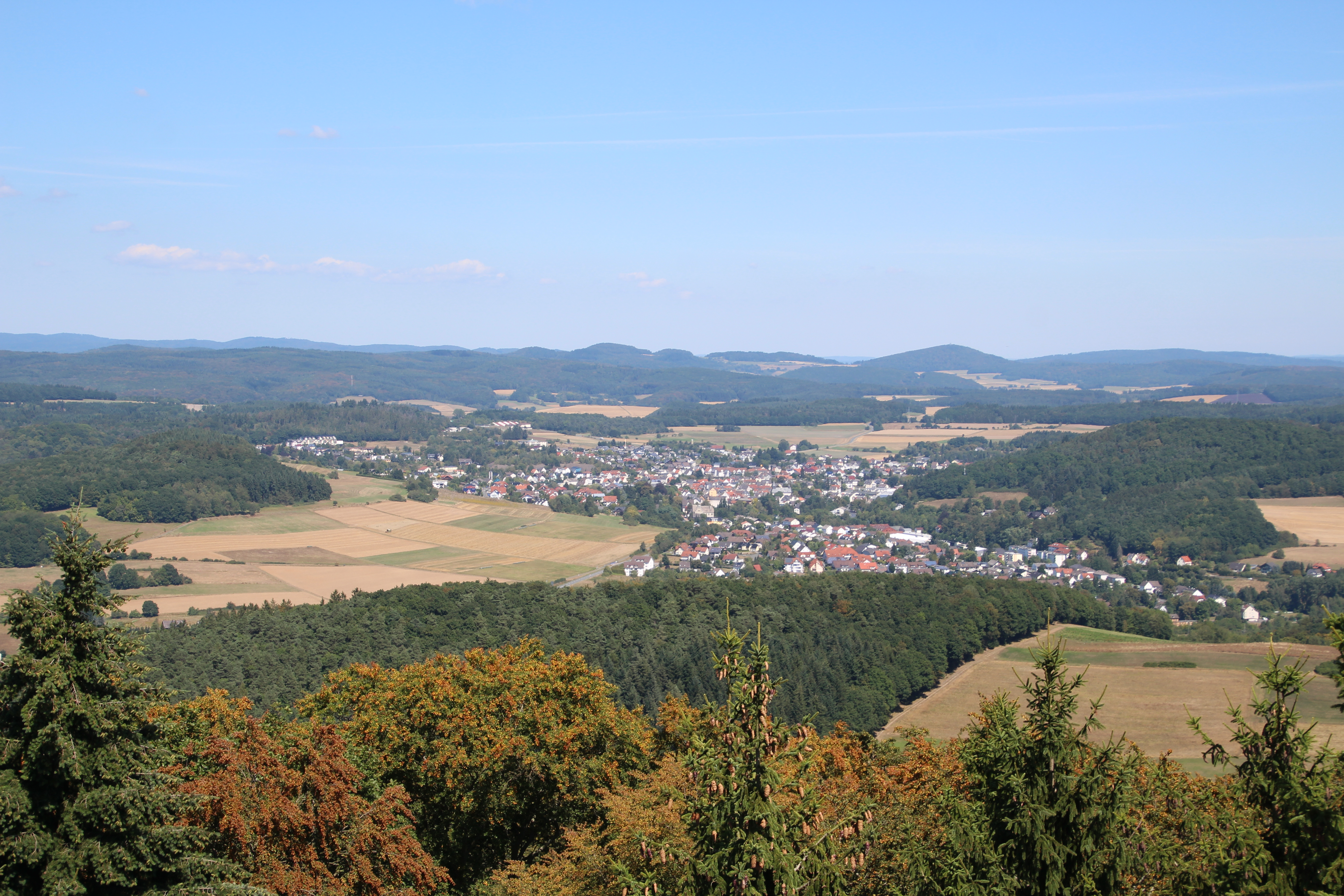 Siehe Bild und Dateiname